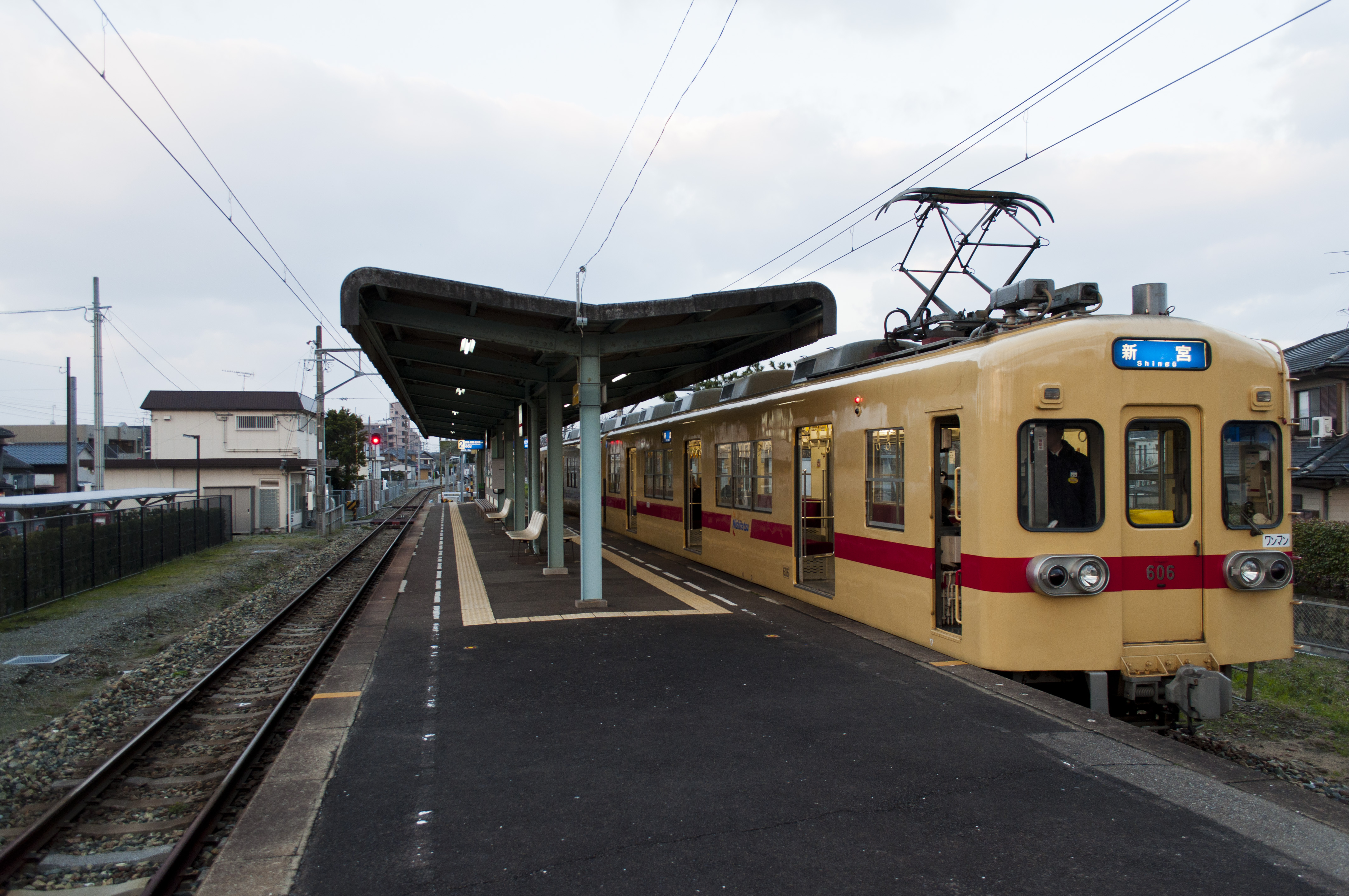 西鉄新宮駅のホーム